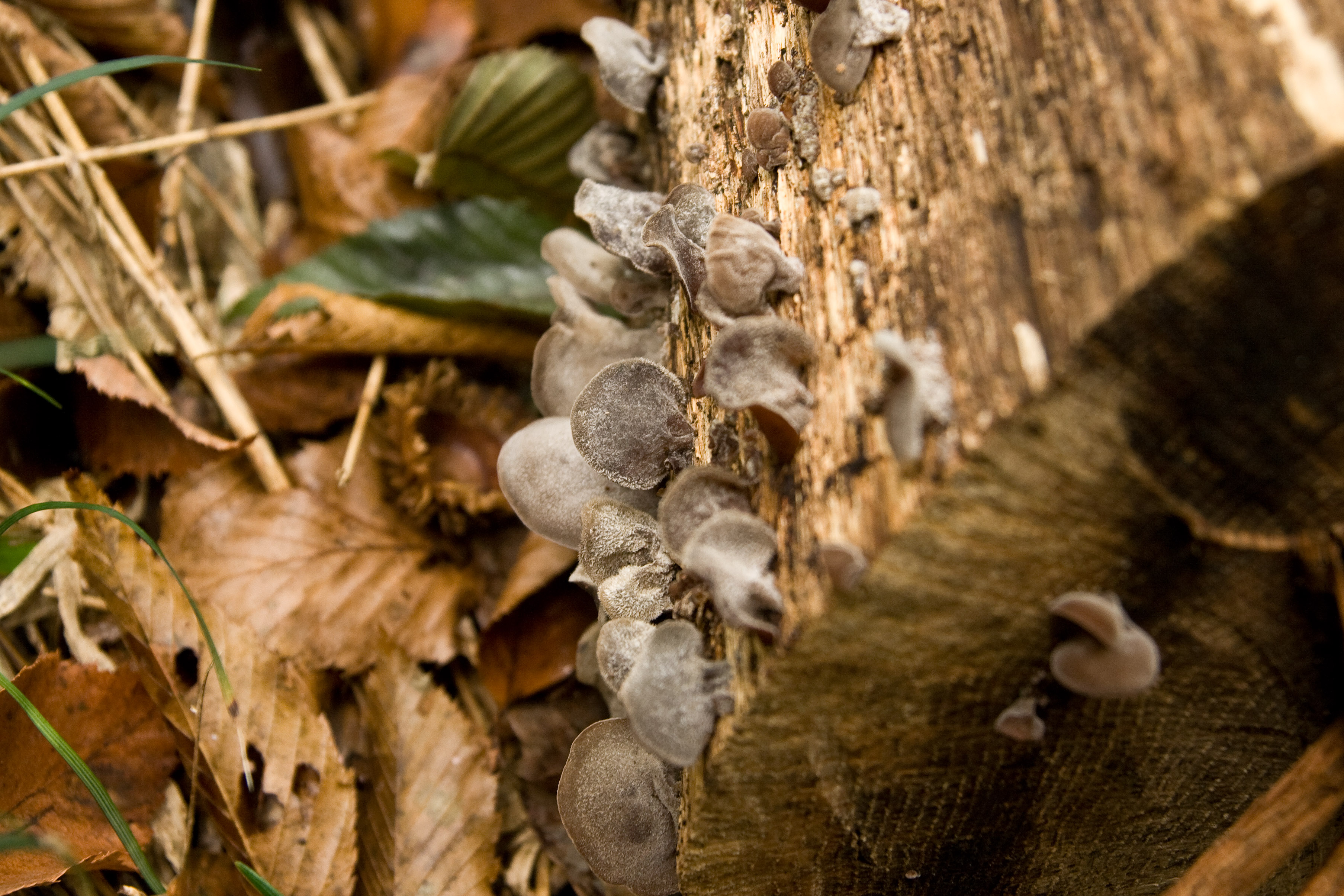 アラゲキクラゲ (学名:Auricularia polytricha)